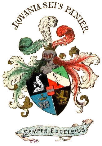 Wapenschild van K.A.V. Lovania Löwen (1906)